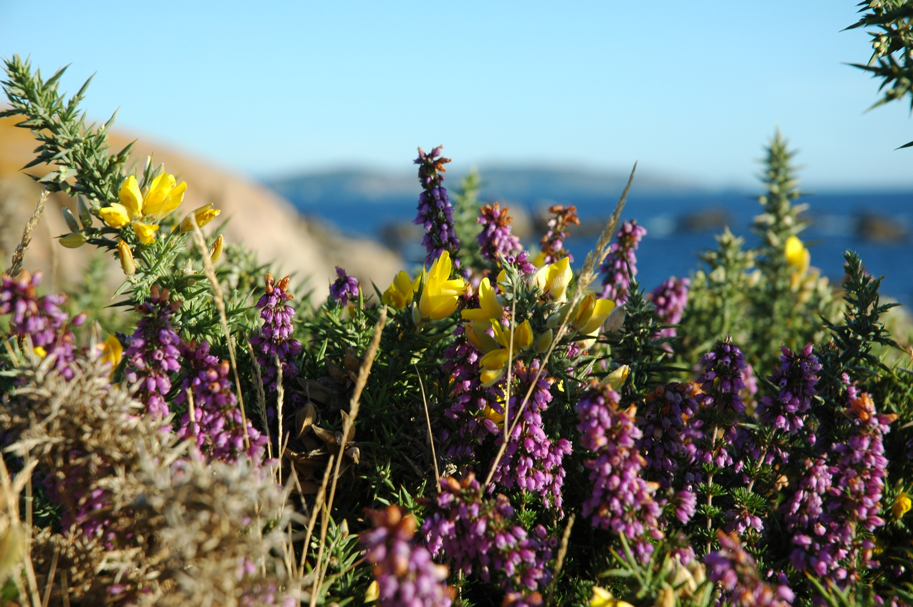 Toxos e breixos preto do Grove